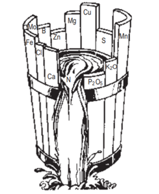 Liebigi miinimuseadus